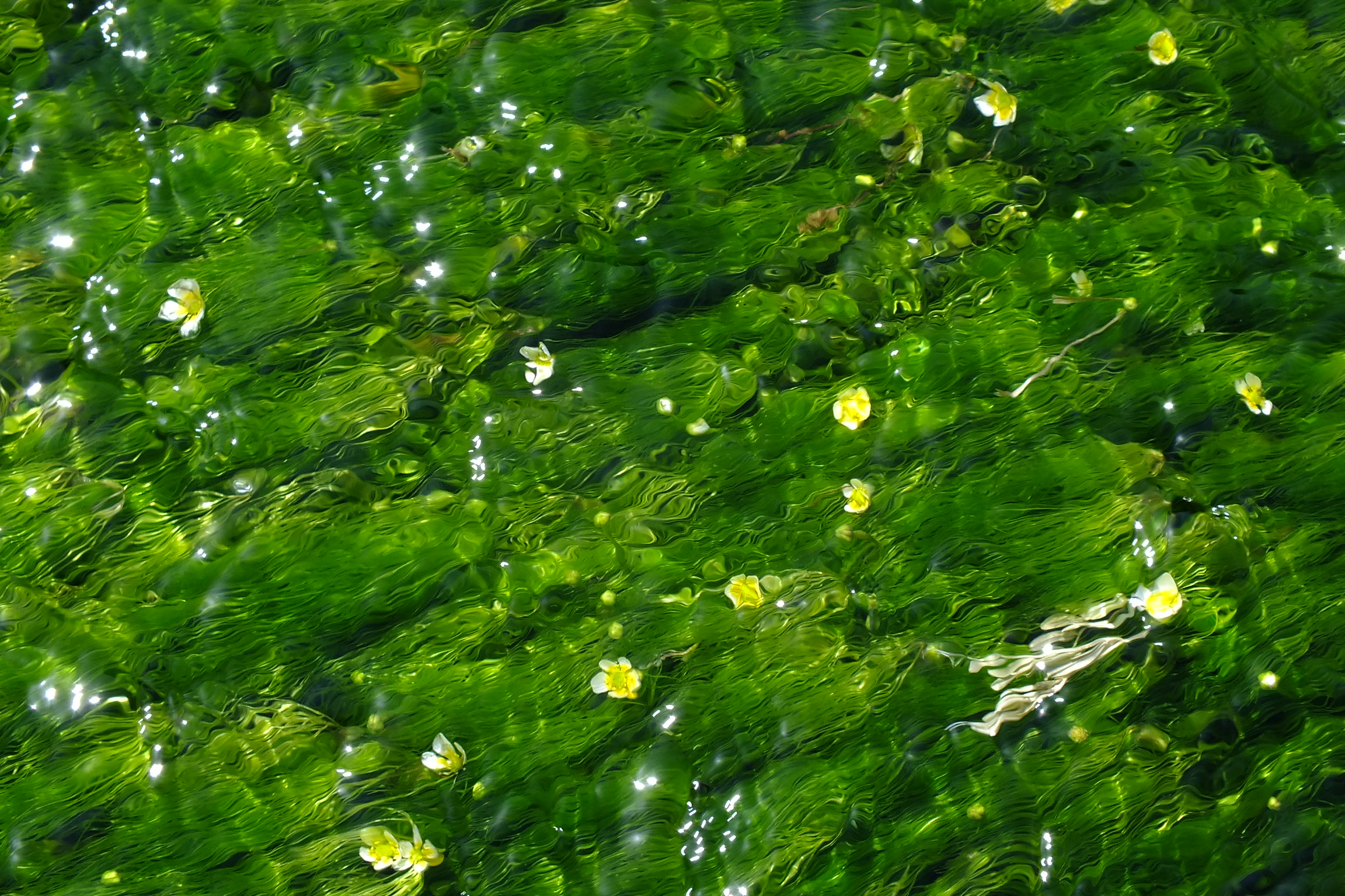 2016-05-05 Ranunculus nipponicus バイカモ（梅花藻）多可町加美区大袋